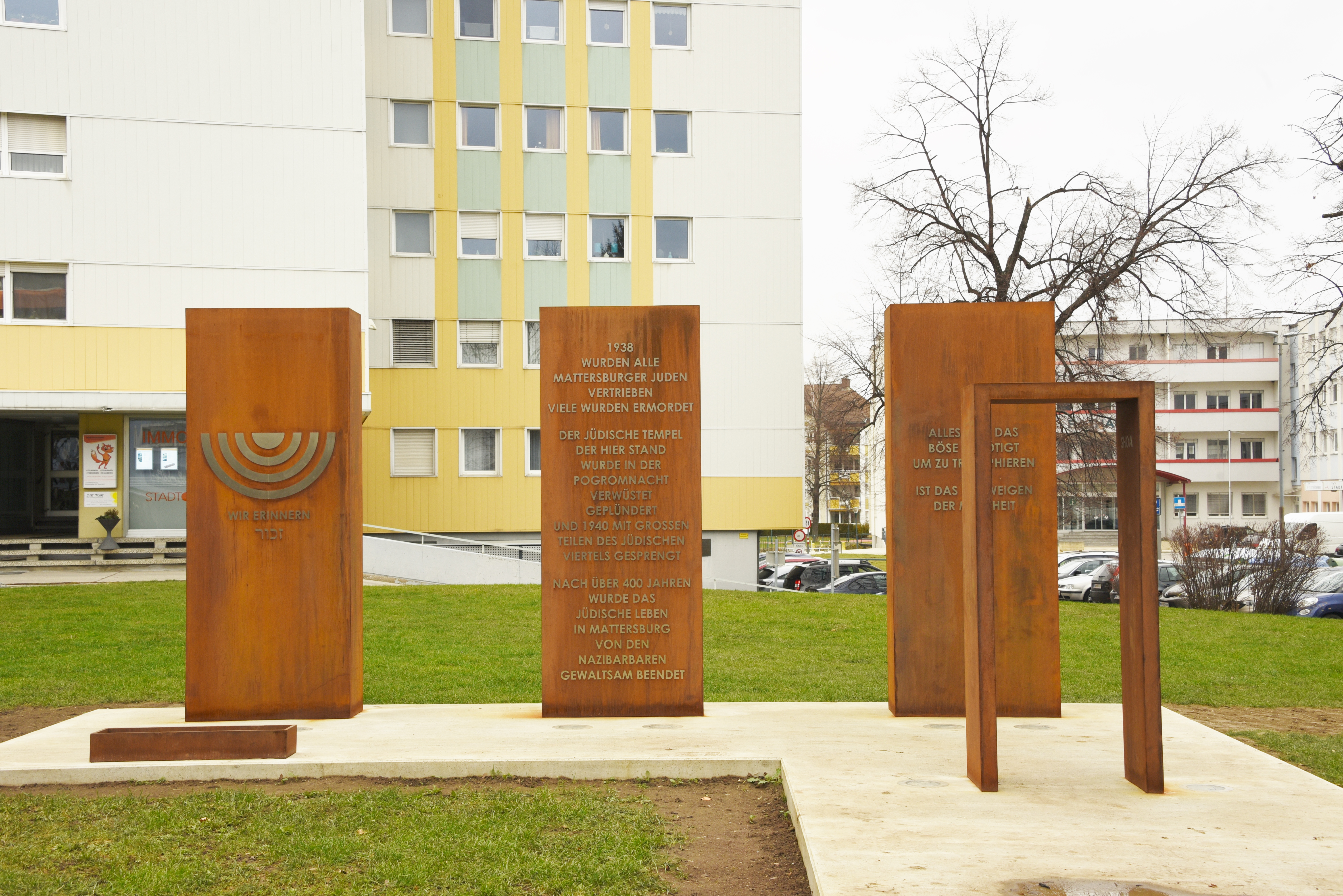 Gesamtansicht